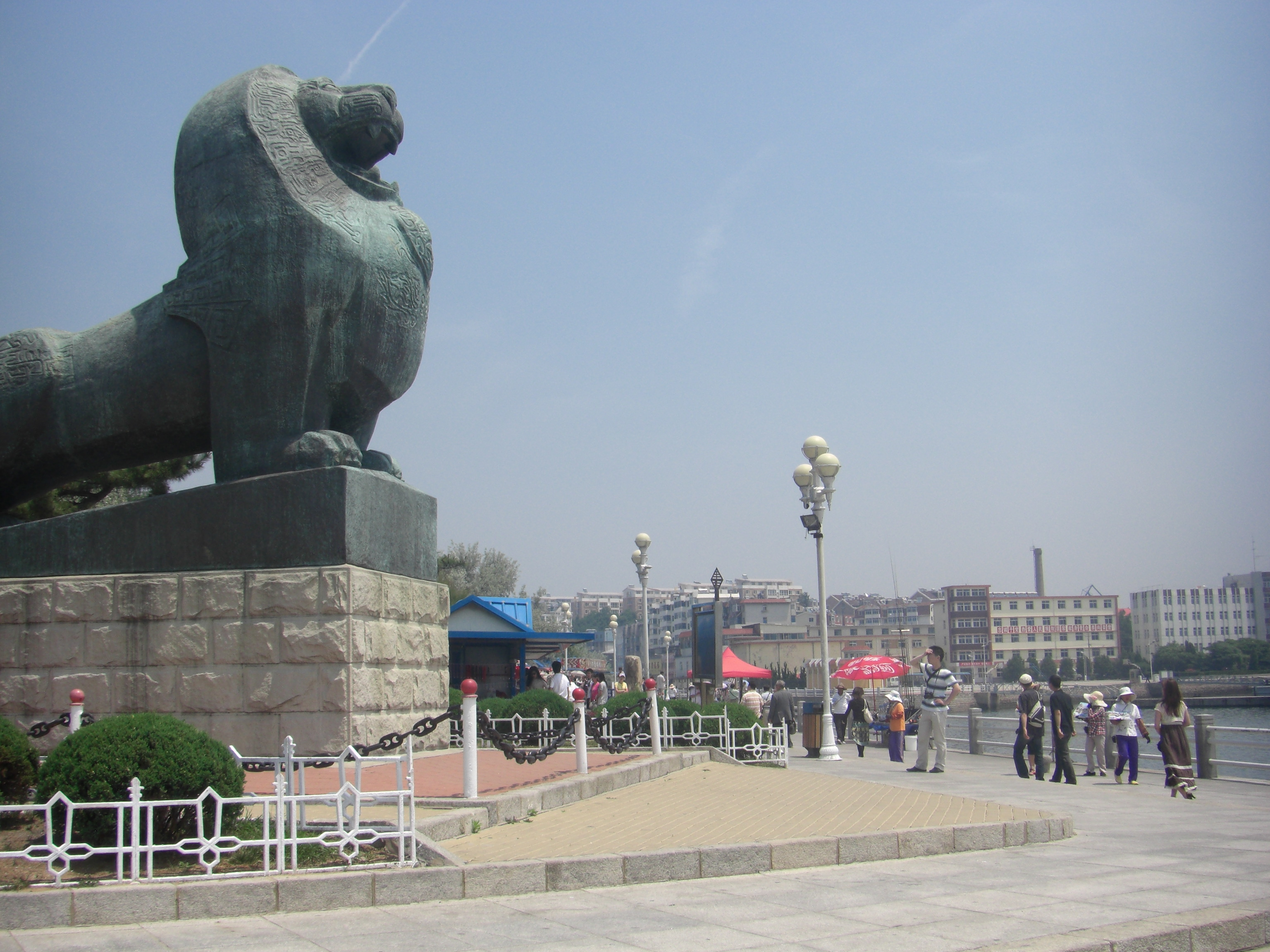 大連軍港公園醒獅子像